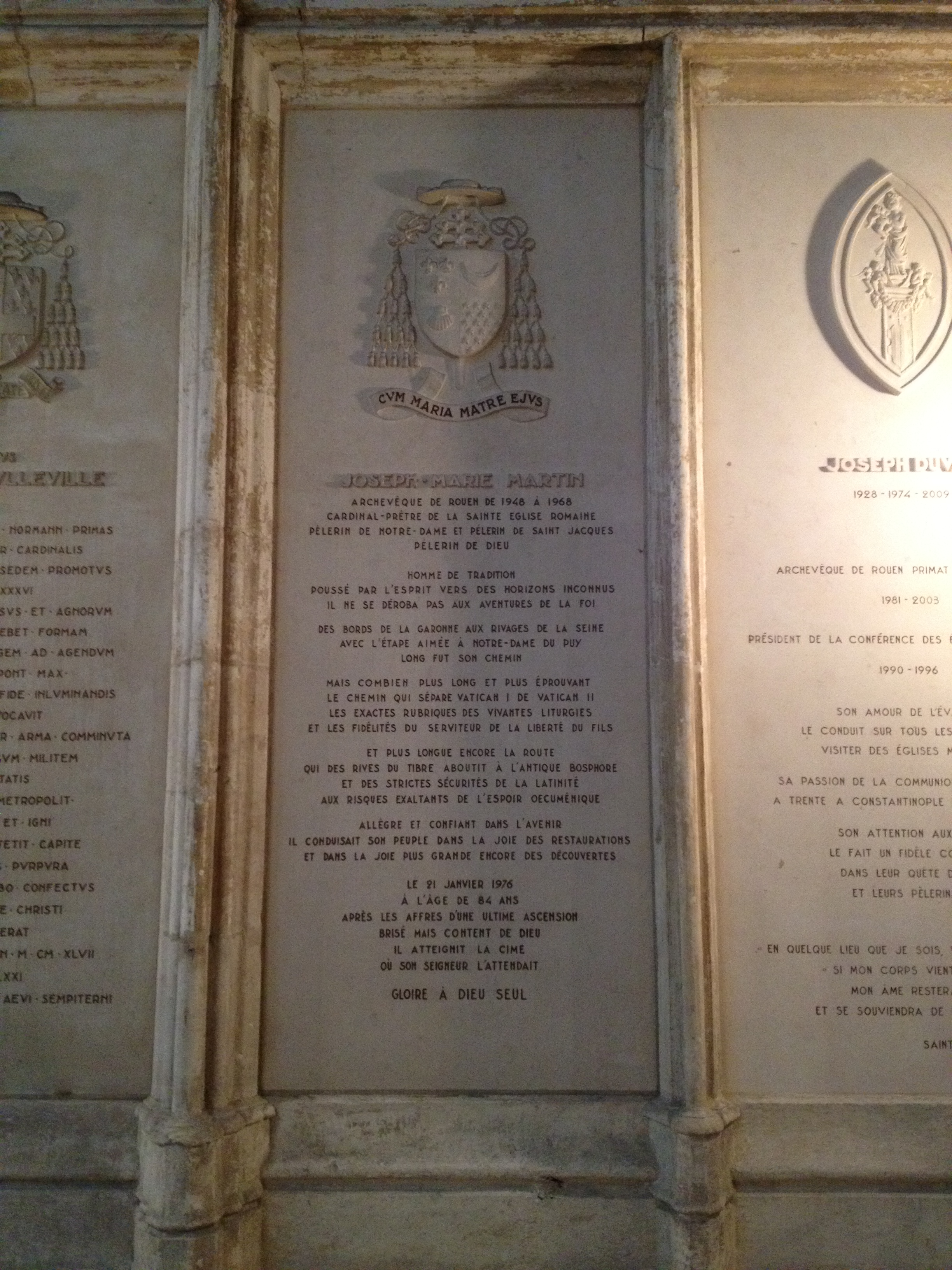 Plaque commémorative de Joseph Marie Martin.